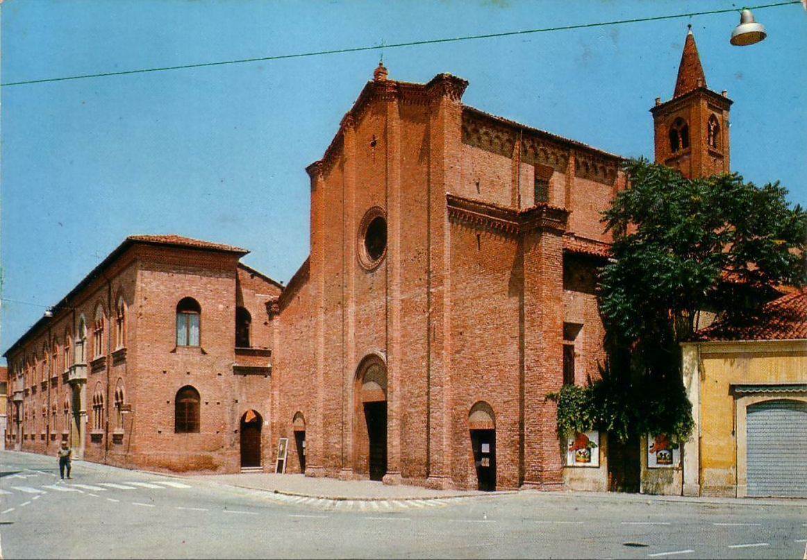 Chiesa di San Francesco (Mirandola, 1970)